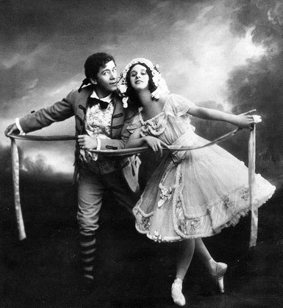 Anna Pavlova: Lise, Nikolai_Legat: Colas dans "La fille mal gardée. Berlin